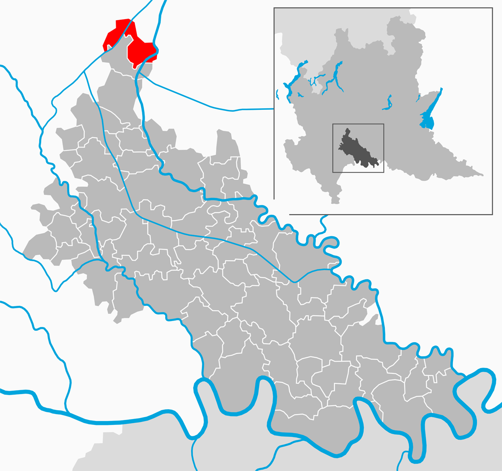 Il comune di Comazzo nella provincia di Lodi